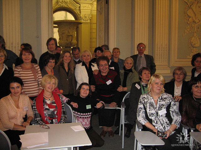 Елена Пантелеевна Яковлева в кругу коллег на конференции: Изобразительное искусство, архитектура и искусствоведение Русского зарубежья: проблемы, открытия, перспективы исследований